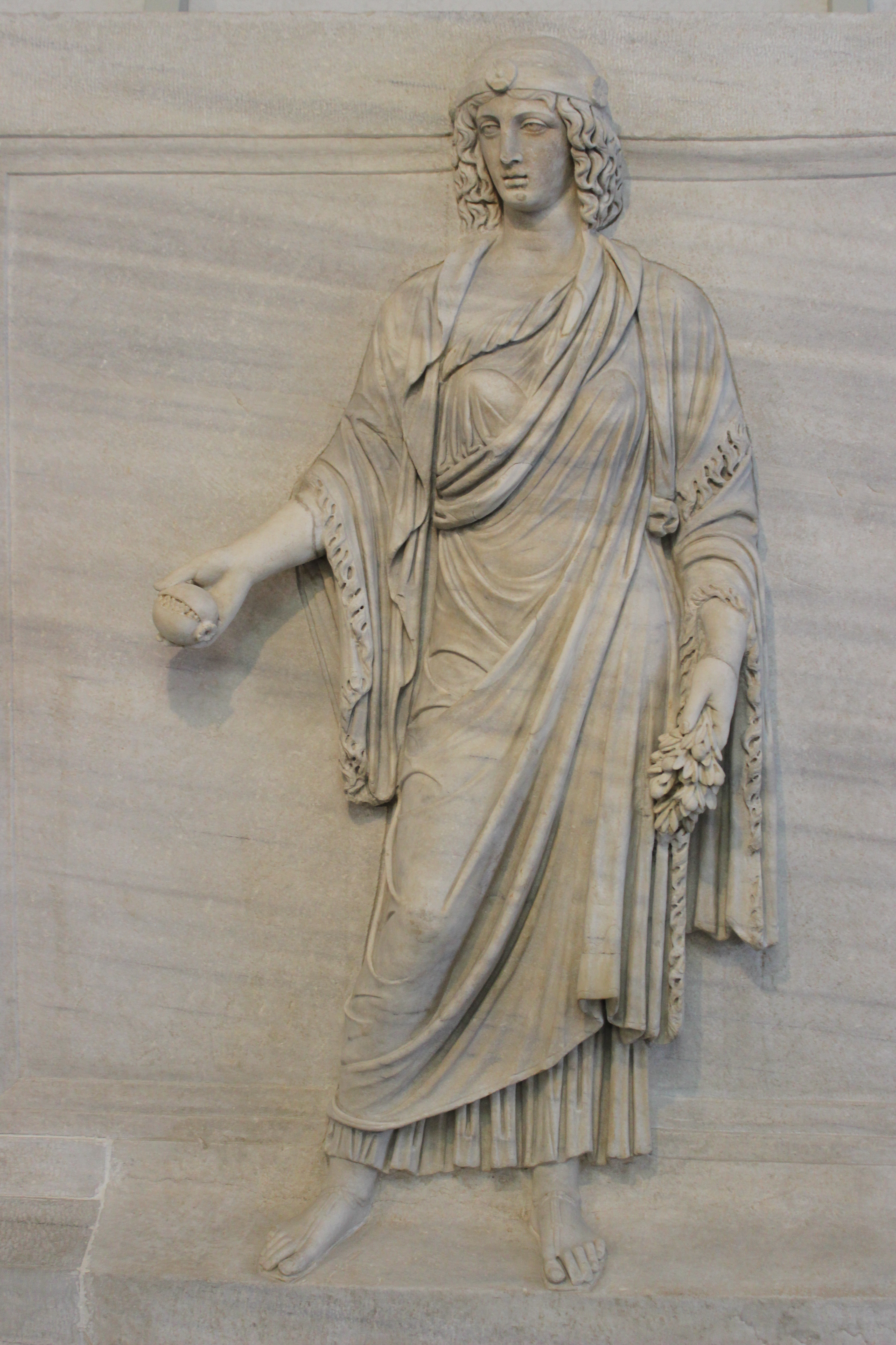 Roma. Palazzo Massimo alle Terme. Relieve con posible representación de Egipto. Procedente del Hadrianeum de Roma.